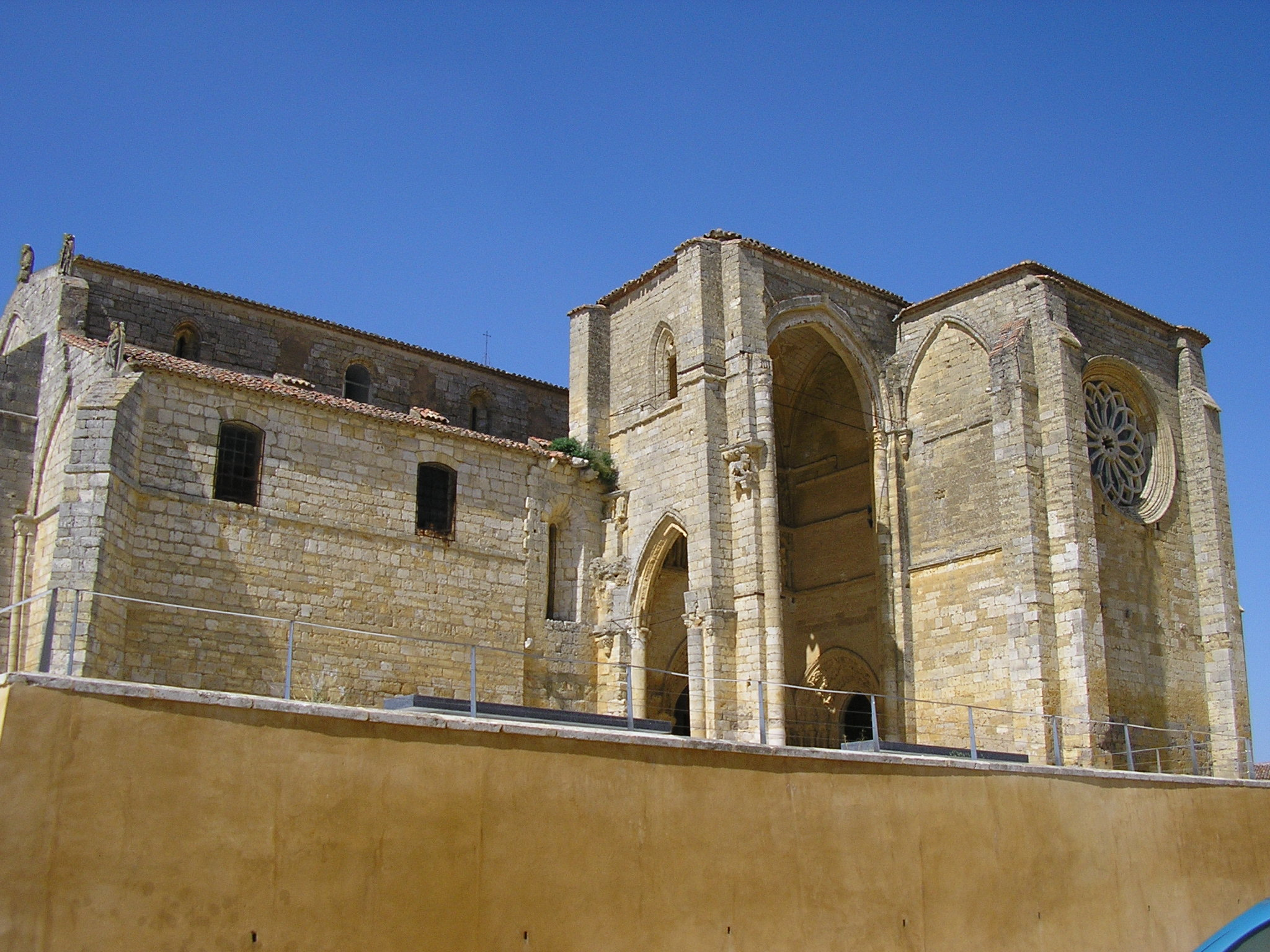 Villalcazar de Sirga - Iglesia de Santa Maria (Vista Exterior)